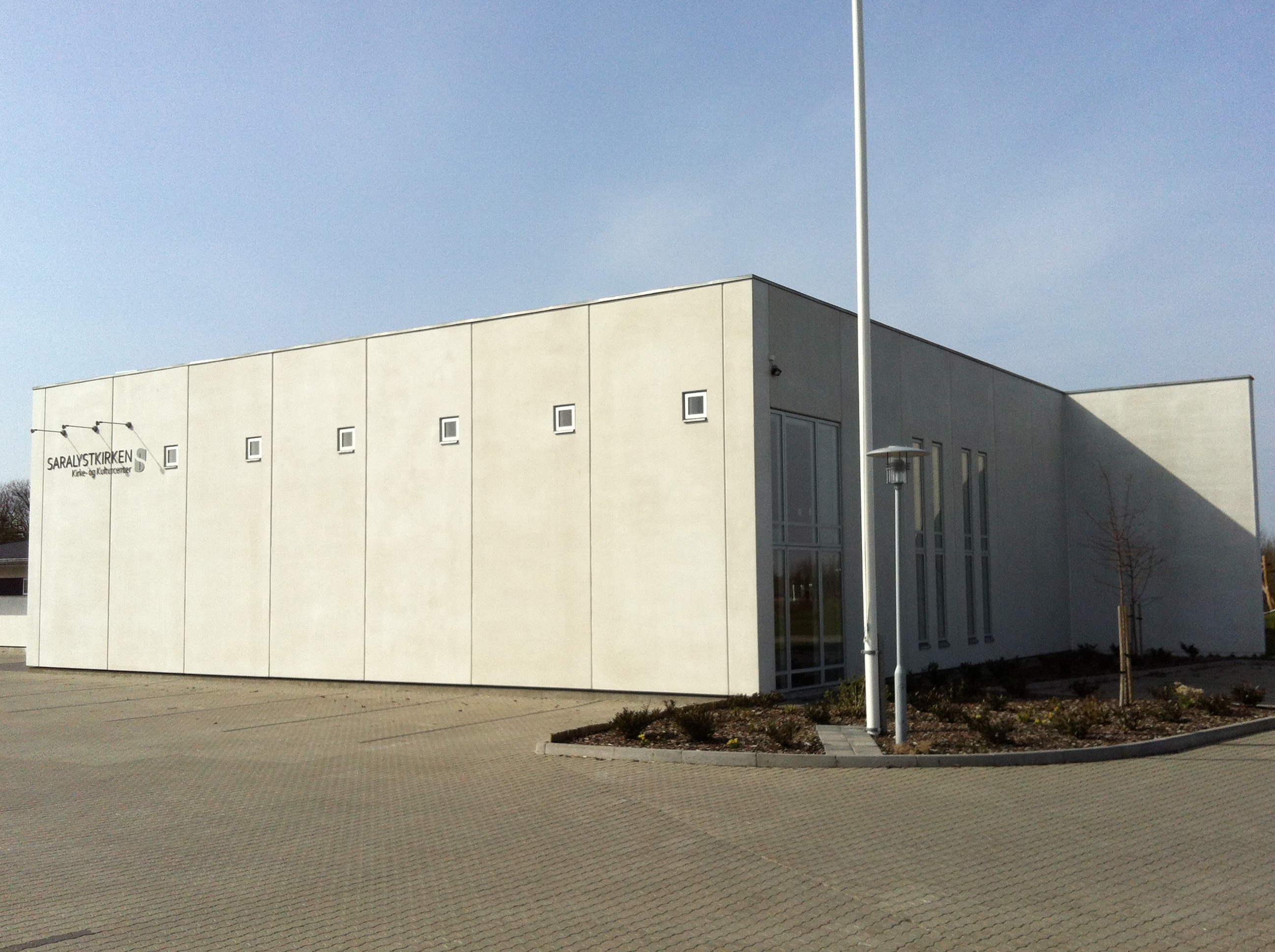 Saralyst kirken i Århus